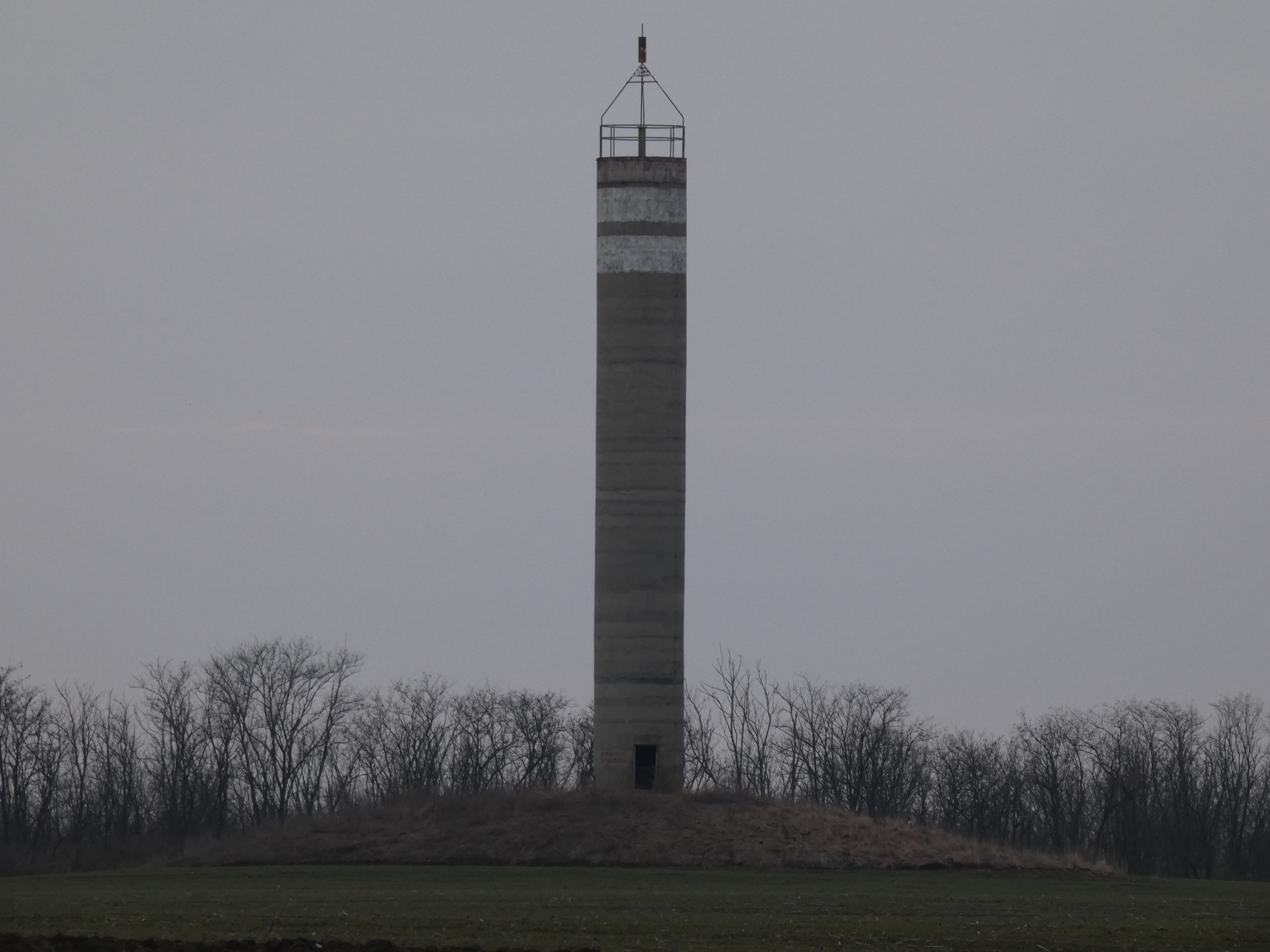 Geodéziai mérőtorony (Létavértes-Cserekert, Laponya-halom)